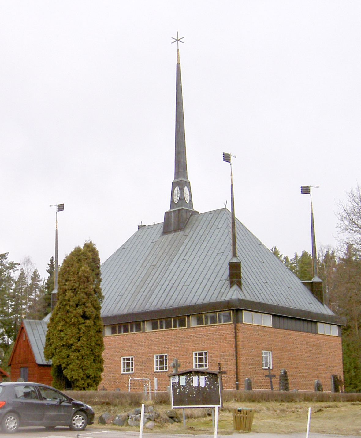 Aspeboda kyrka, Aspeboda, Sverige/Sweden